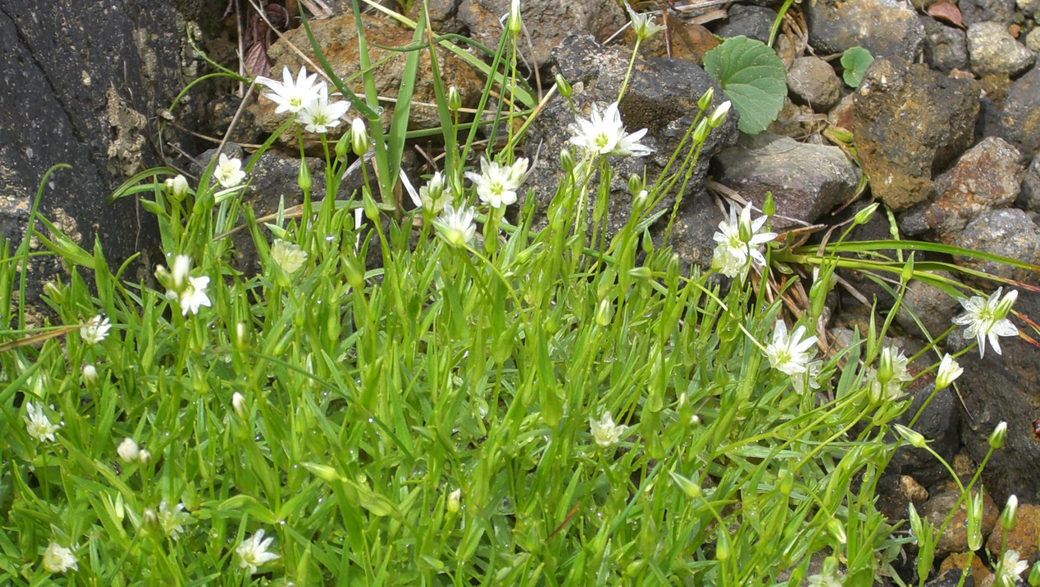 Stellaria_nipponica at Daisetsu-zan 大雪山のエゾイワツメクサ